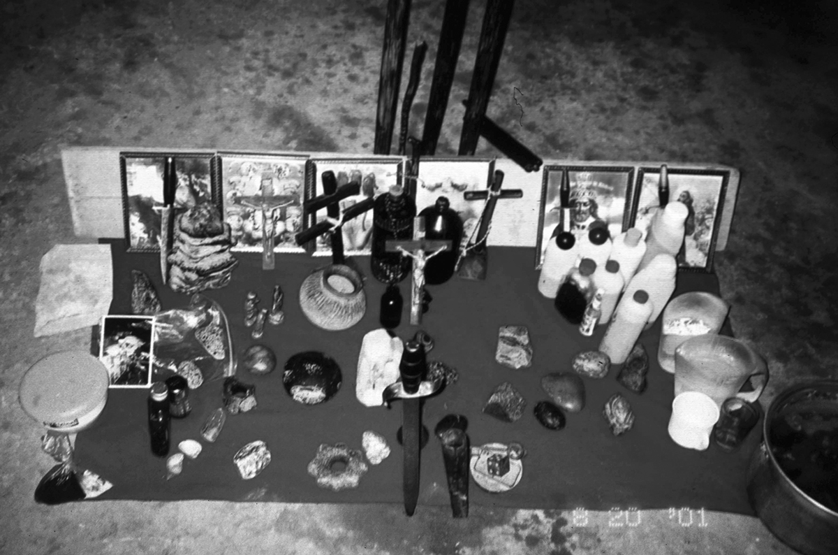 Referencia electrónica Bonnie Glass-Coffin, Douglas Sharon y Santiago Uceda, « Curanderas a la sombra de la Huaca de la Luna », Bulletin de l'Institut français d'études andines [En línea], 33 (1) | 2004, Publicado el 08 abril 2004, consultado el 07 octubre 2019. URL : ; DOI : 10.4000/bifea.5815